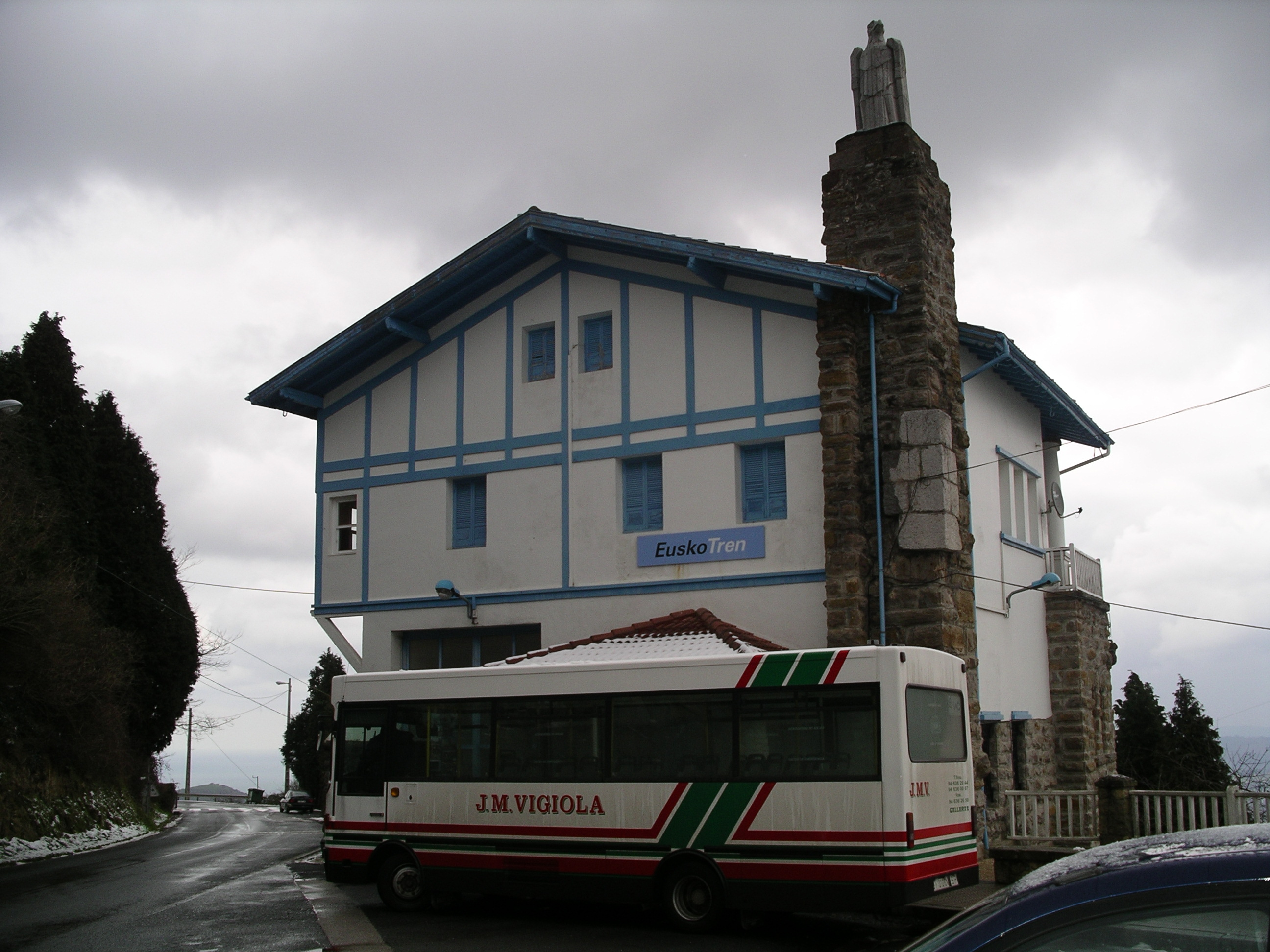 Larrainetako funikularra, goiko geltokia, Larraineta, Trapagaran, Meatzaldea, Bizkaia, Euskal Herria.